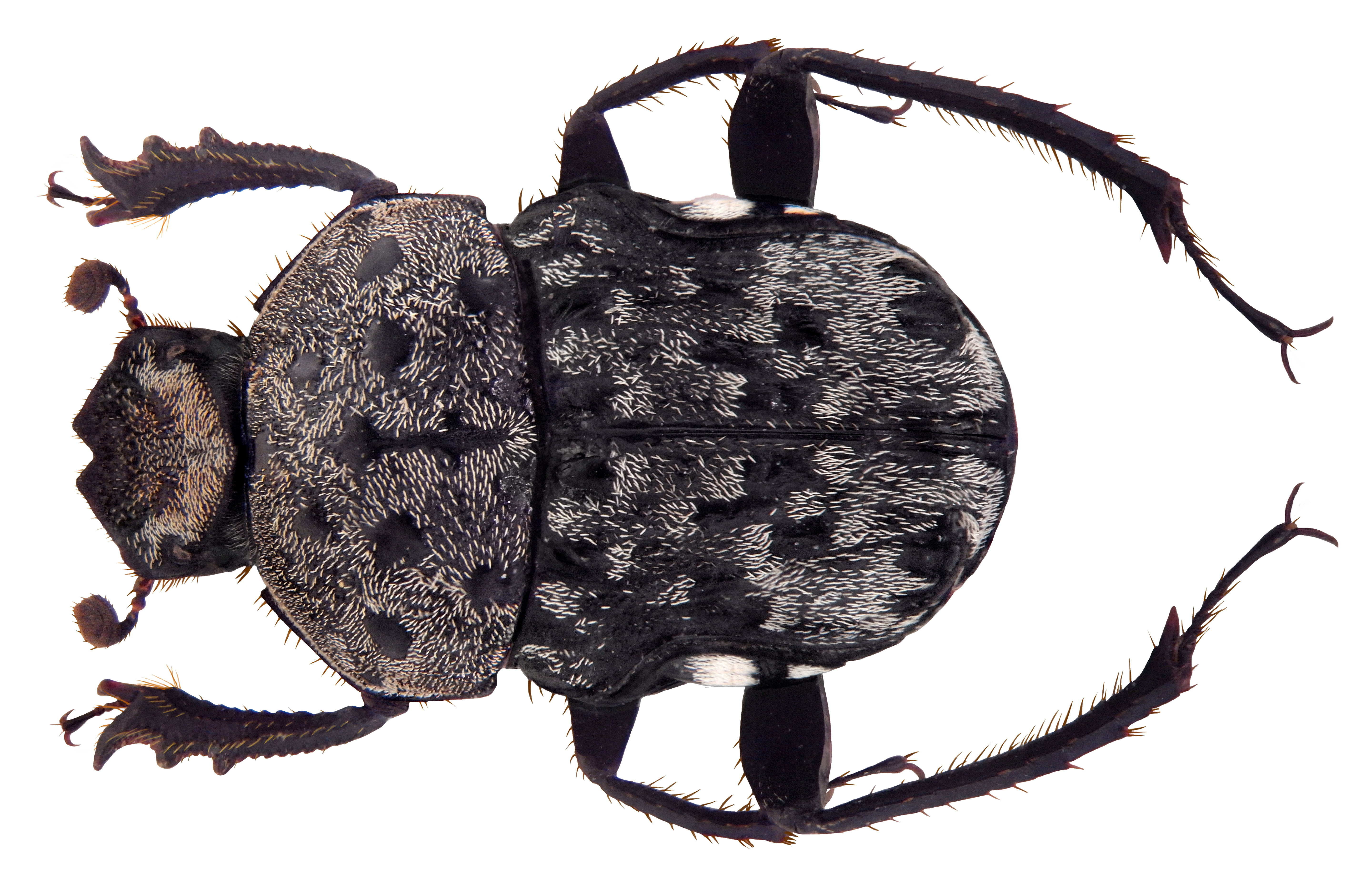 Familie: Scarabaeidae Groesse: 8,6 mm Fundort: Süd-Indien, State Madras, Coimbatore leg. Barmer, 1982; det. H.Pascher Photo: U.Schmidt, 2010